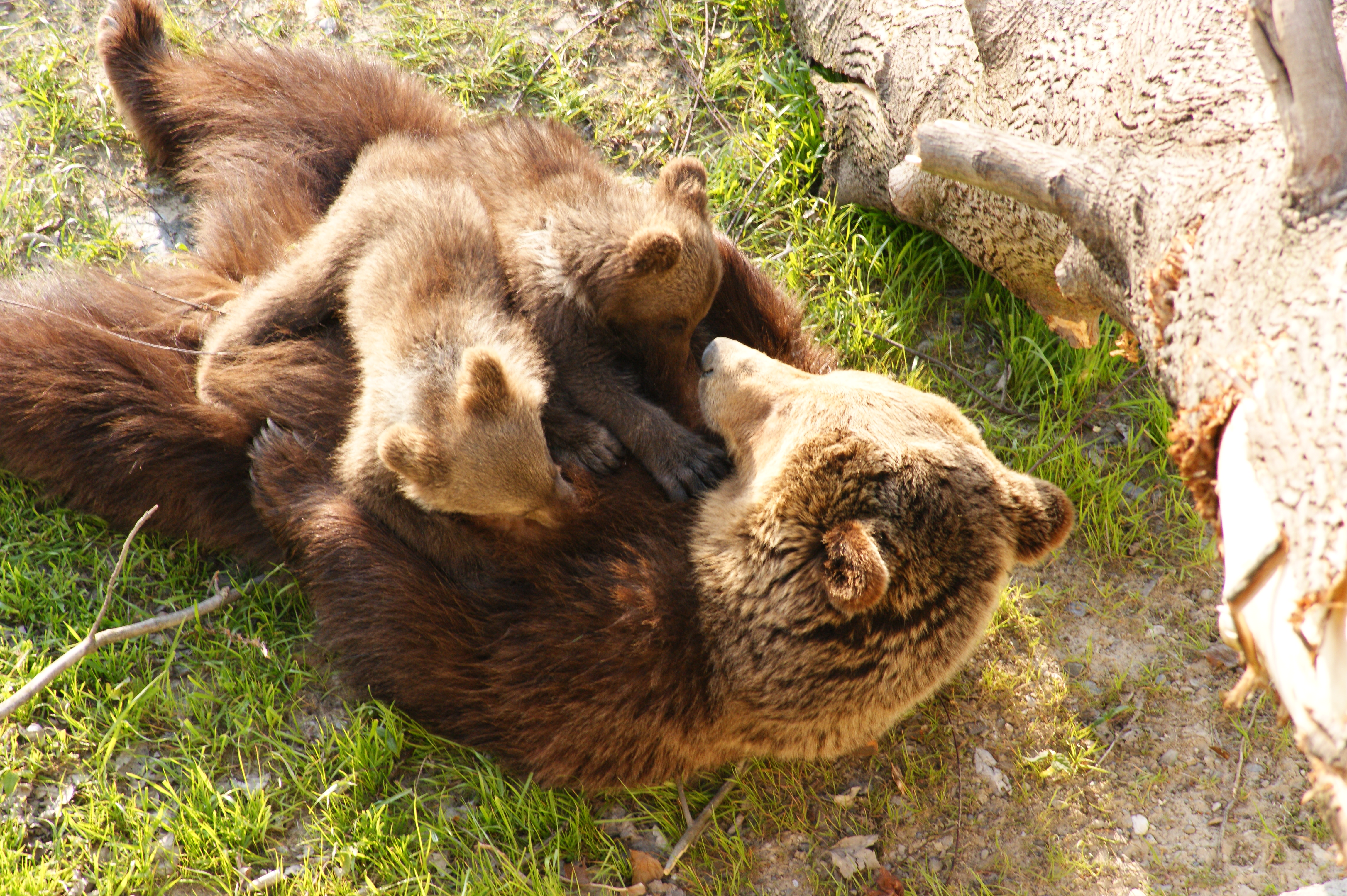 Ours brun allaitant au parc aux Ours de Bern